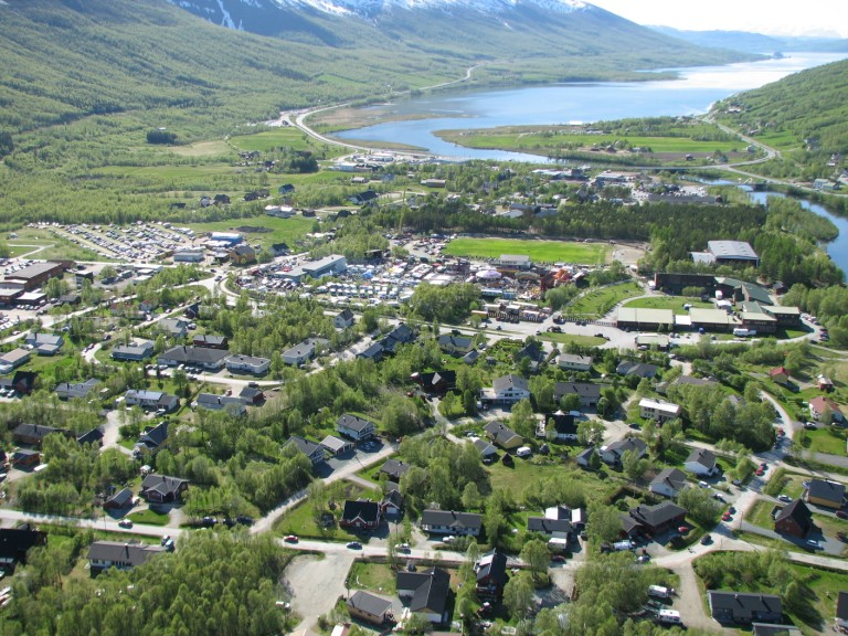 Flybilde av Nordkjosbotn fra øst under Nordkjosmessa 2007